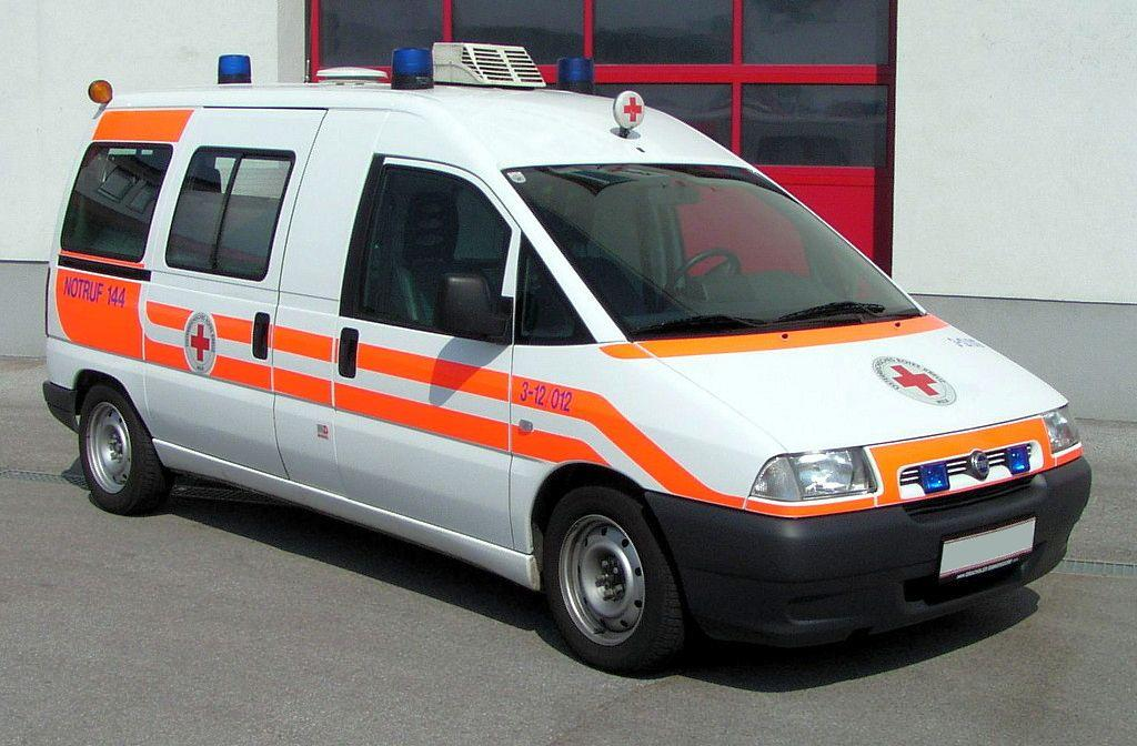 Krankentransportwagen Fiat Scudo mit langem Radstand, 109 PS, 1,9 Liter JTD Dieselmotor. Umbau durch Fa. Dlouhy, Tulln.